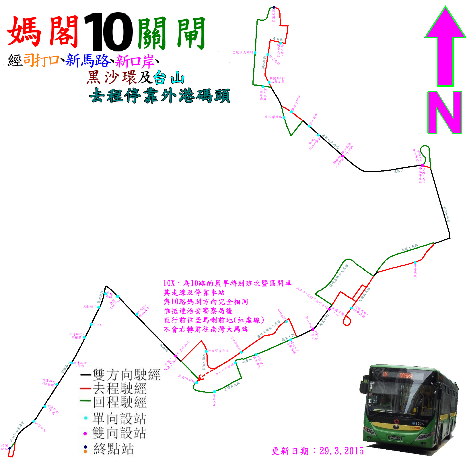 中文（香港）: 澳門巴士10號線的走線圖